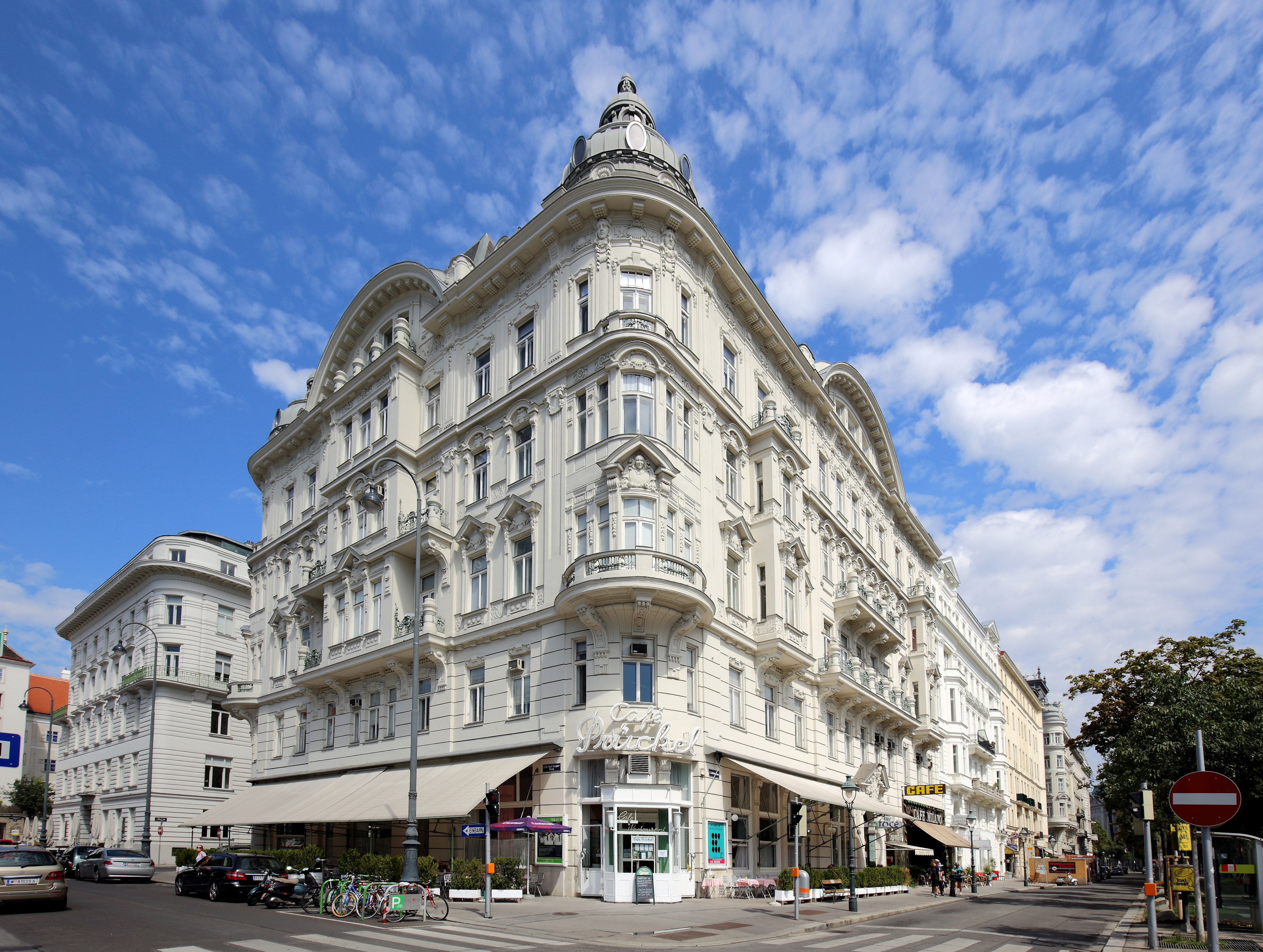 Wohn- und Geschäftshauus, Straßenecke Stubenring 24 und Dr.-Karl-Lueger-Platz 6, in der österreichischen Bundeshauptstadt Wien. Das mächtige späthistoristische Gebäude wurde im Auftrag des Rechtsanwaltes Adolf Gallia nach Plänen des Architekten Jakob Gartner in den Jahren das 1902/1903 errichtet. Im Erdgeschoß befindet sich das Café Prückel.